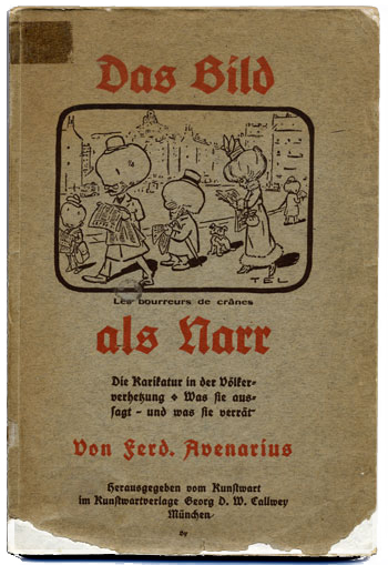 Cover „Das Bild als Narr“